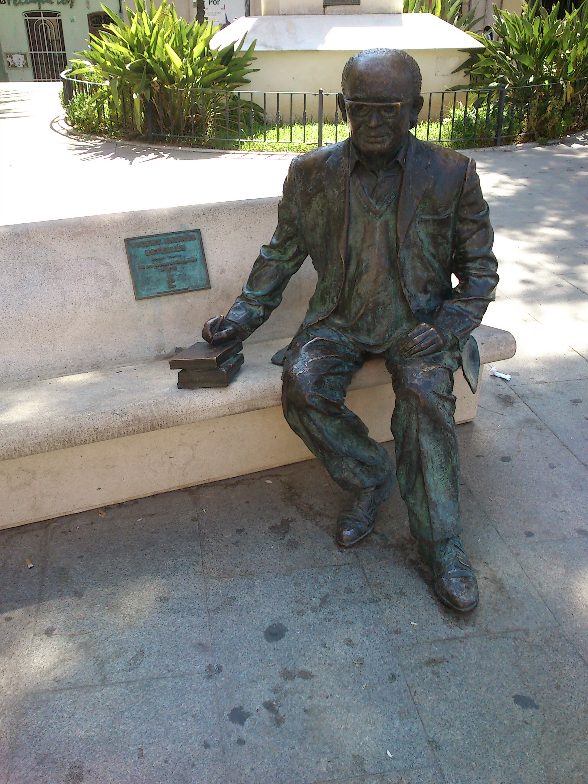 Estatua en bronce del poeta valenciano Vicent Andrés Estellés en su emplazamiento habitual, en la plaza Emilio Castelar de Burjassot, València. La autora de la obra es Teresa Cháfer, y en su patilla izquierda, de otro color, puede apreciarse la restauración que le realizaran después de que vándalos blaveros la hubieran atacado.